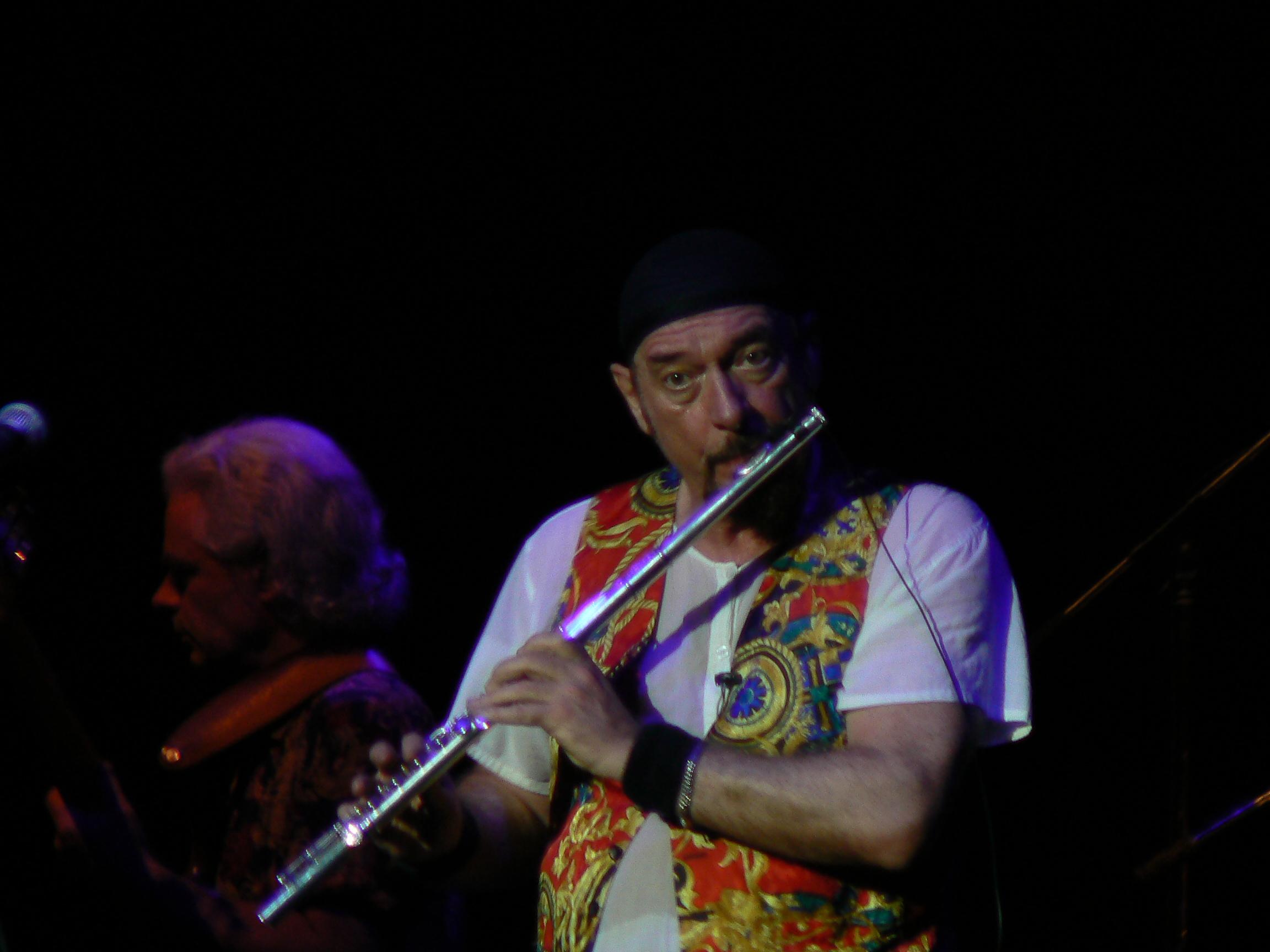 Ian Anderson (Jethro Tull) en concert à Forest National (Bruxelles) en Belgique le 01 juin 2007